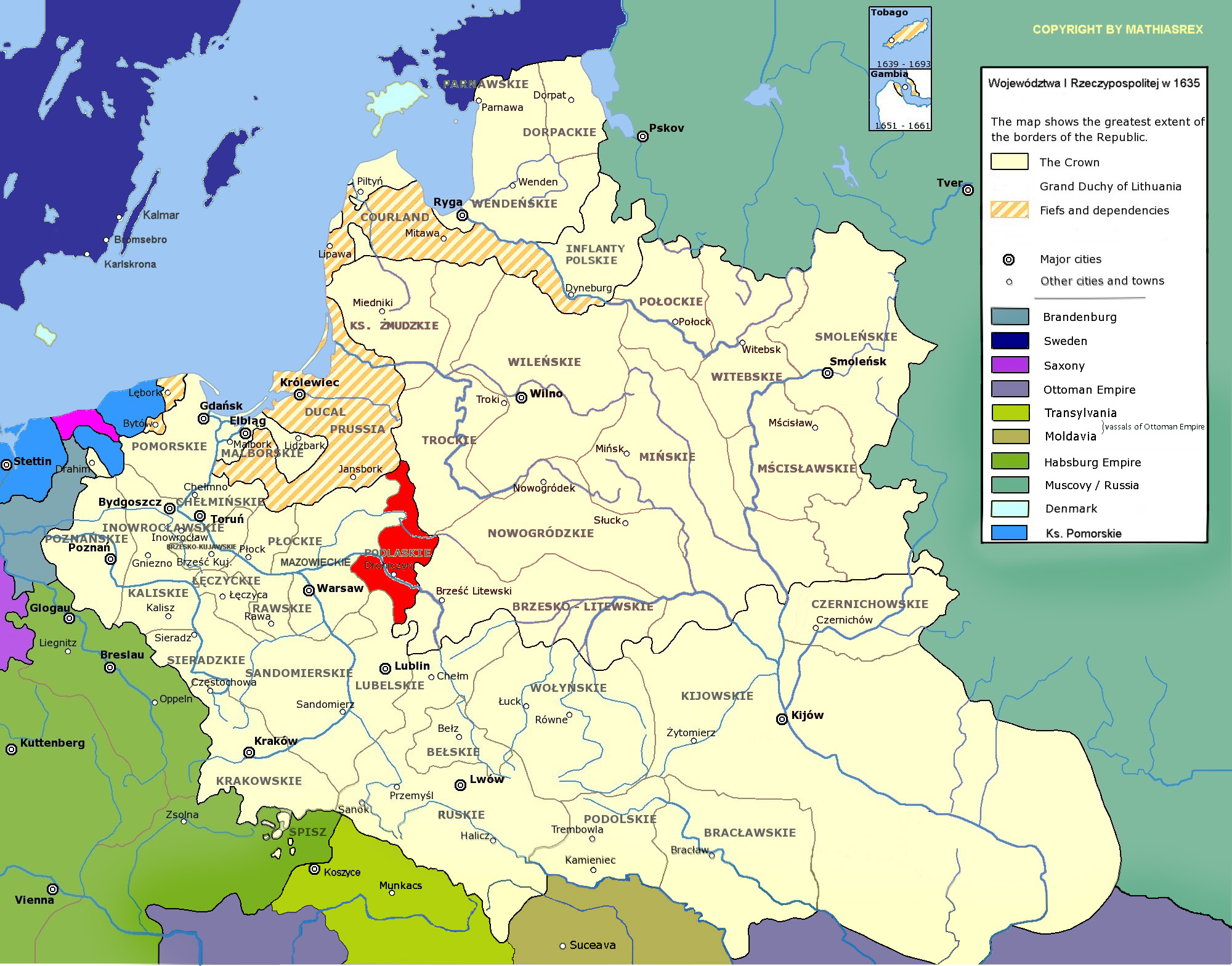 województwo podlaskie I Rzeczypospolitej A modified copy of Image:Rzeczpospolita voivodships.png by Halibutt